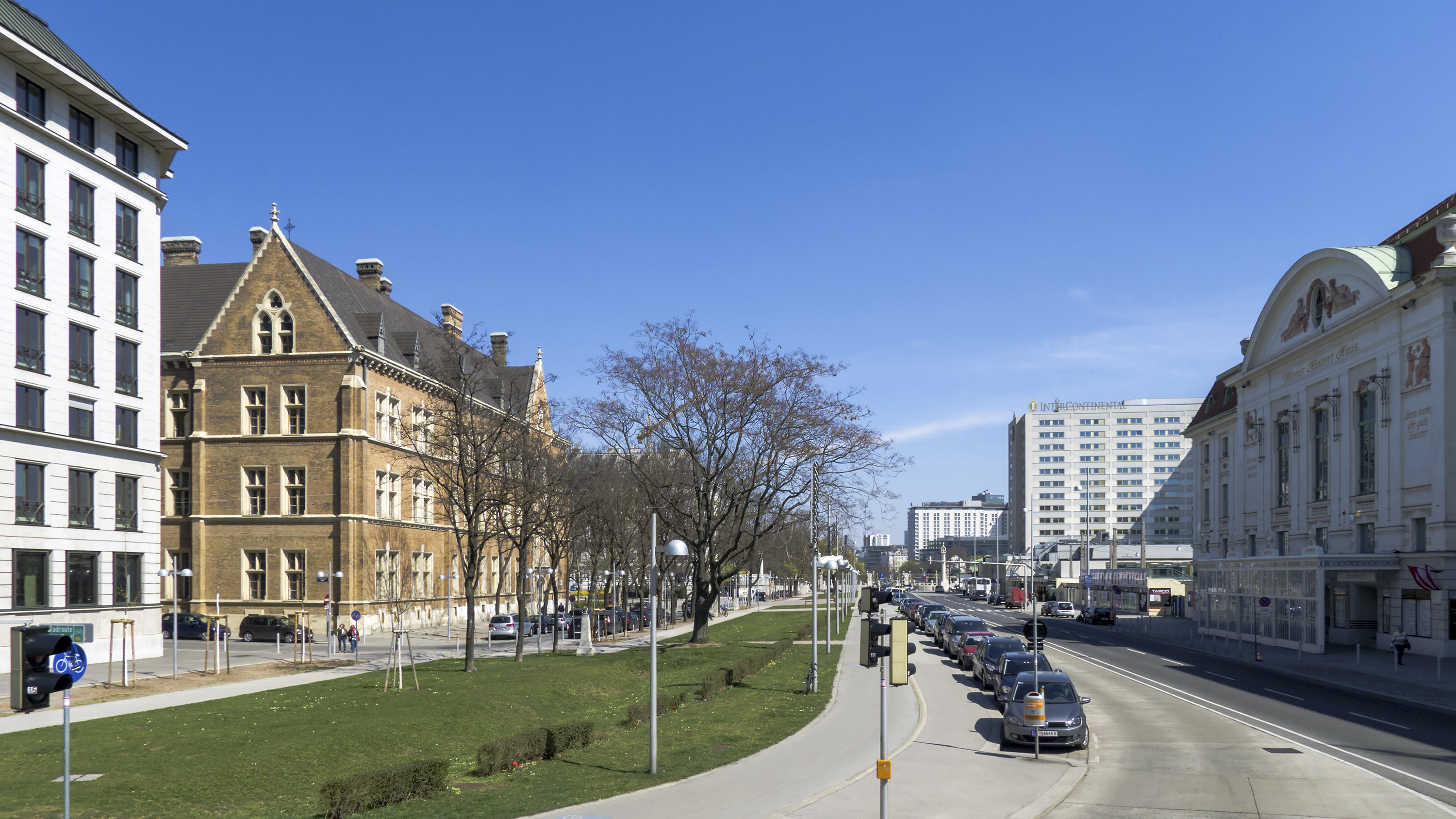 Lothringerstraße in Wien 1 bei Nr. 20 Richtung Nordosten